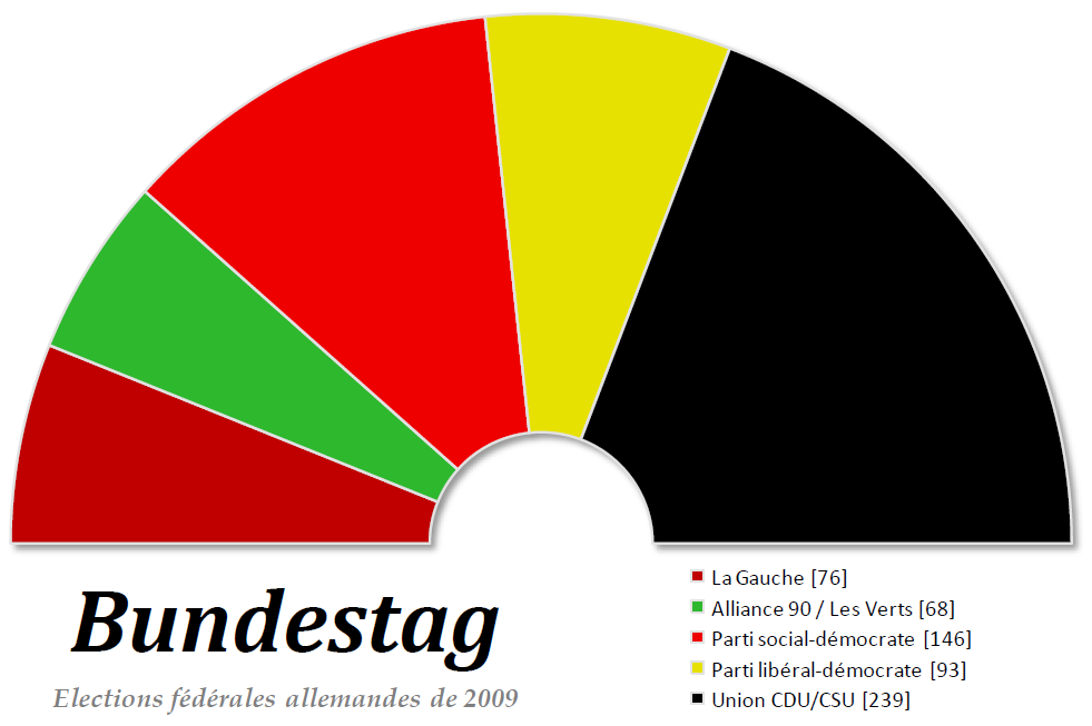 Composition politique du Bundestag issu des élections fédérales allemandes du 28 septembre 2009.